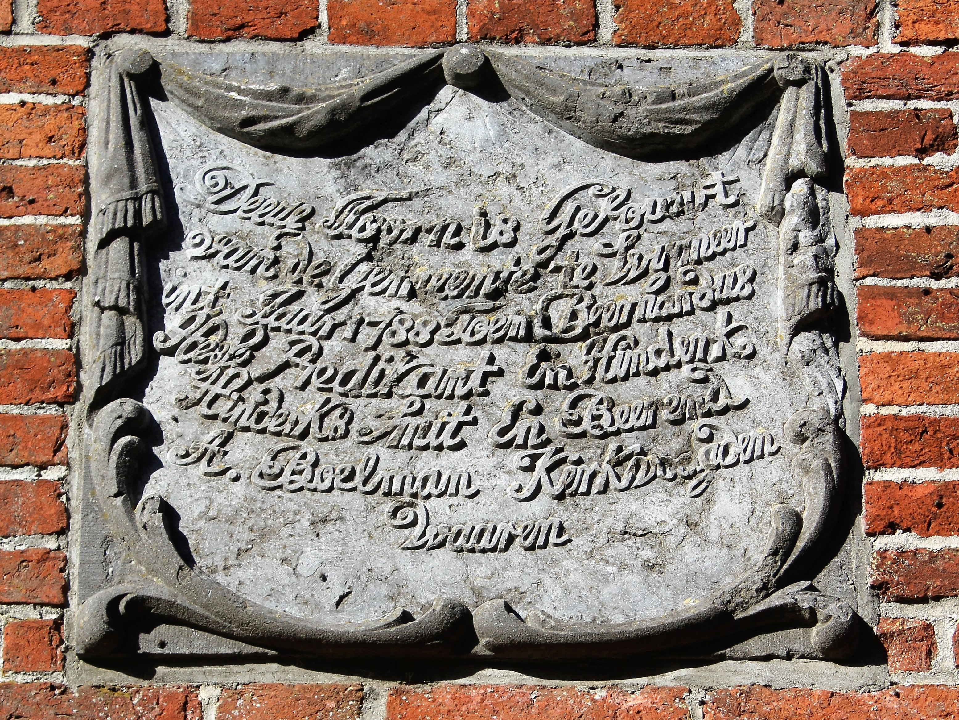 Evangelisch-reformierte Kirche Wymeer, Landkreis Leer, Niedersachsen, Deutschland